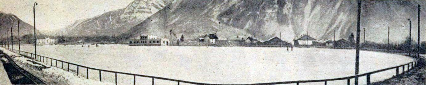 La patinoire de Chamonix en 1924, de 36000m2.